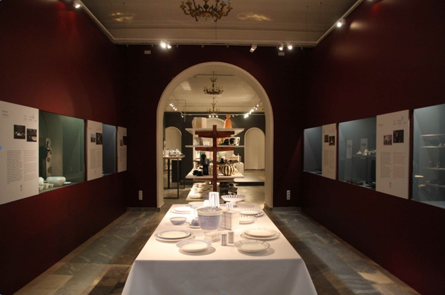 Выставка "Handmade in Germany"